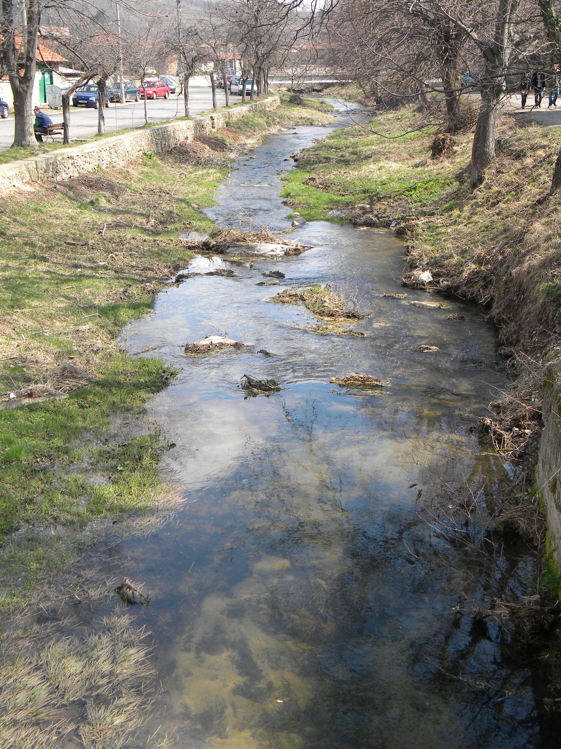 Турийска река